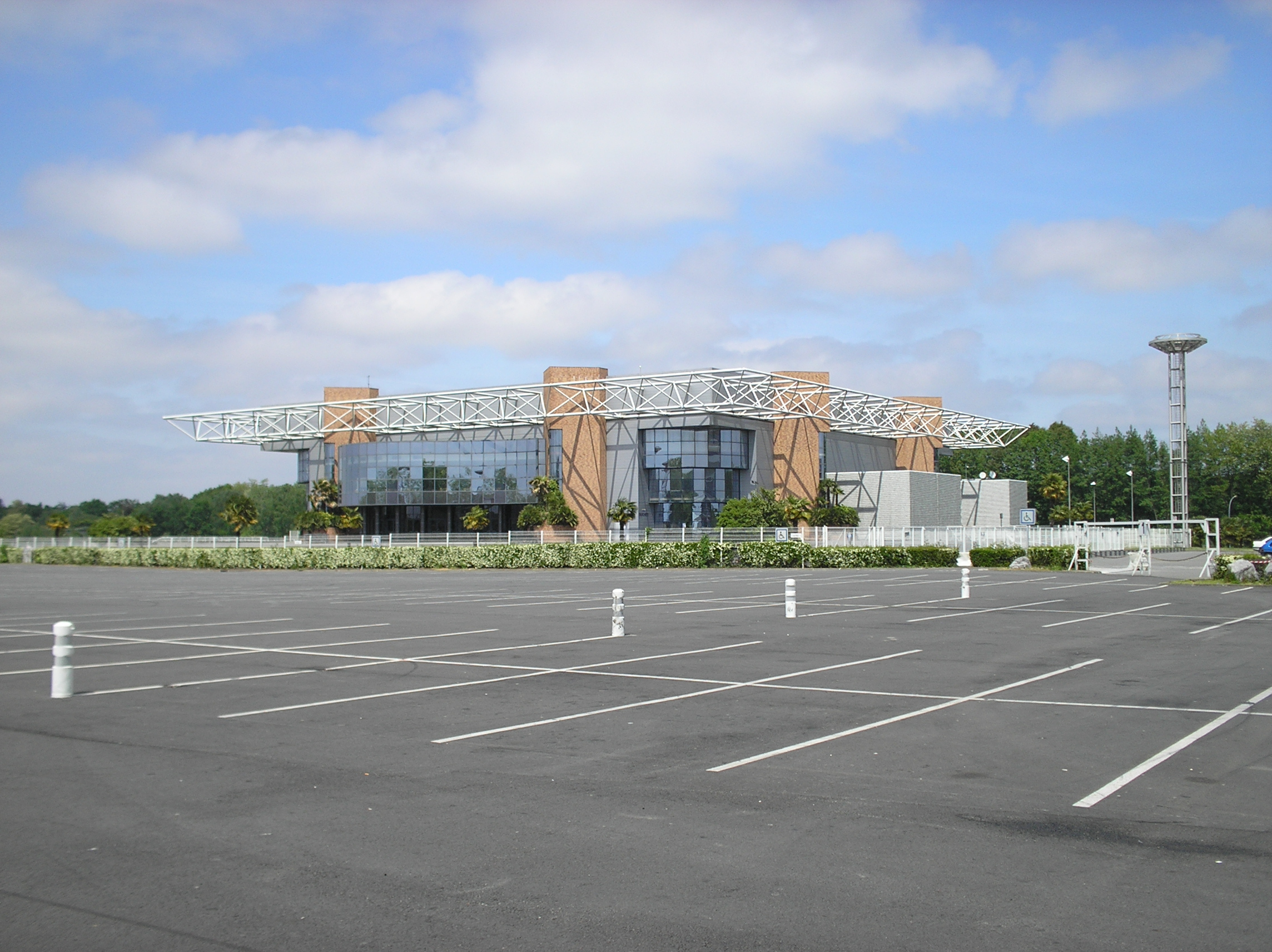 Zénith de Pau, France